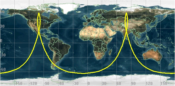 Illustration couverture orbite de Molniya